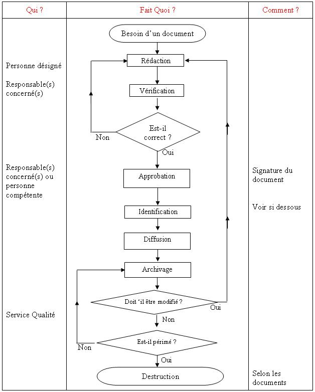 procédure de gestion documentaire pour ISo 9001